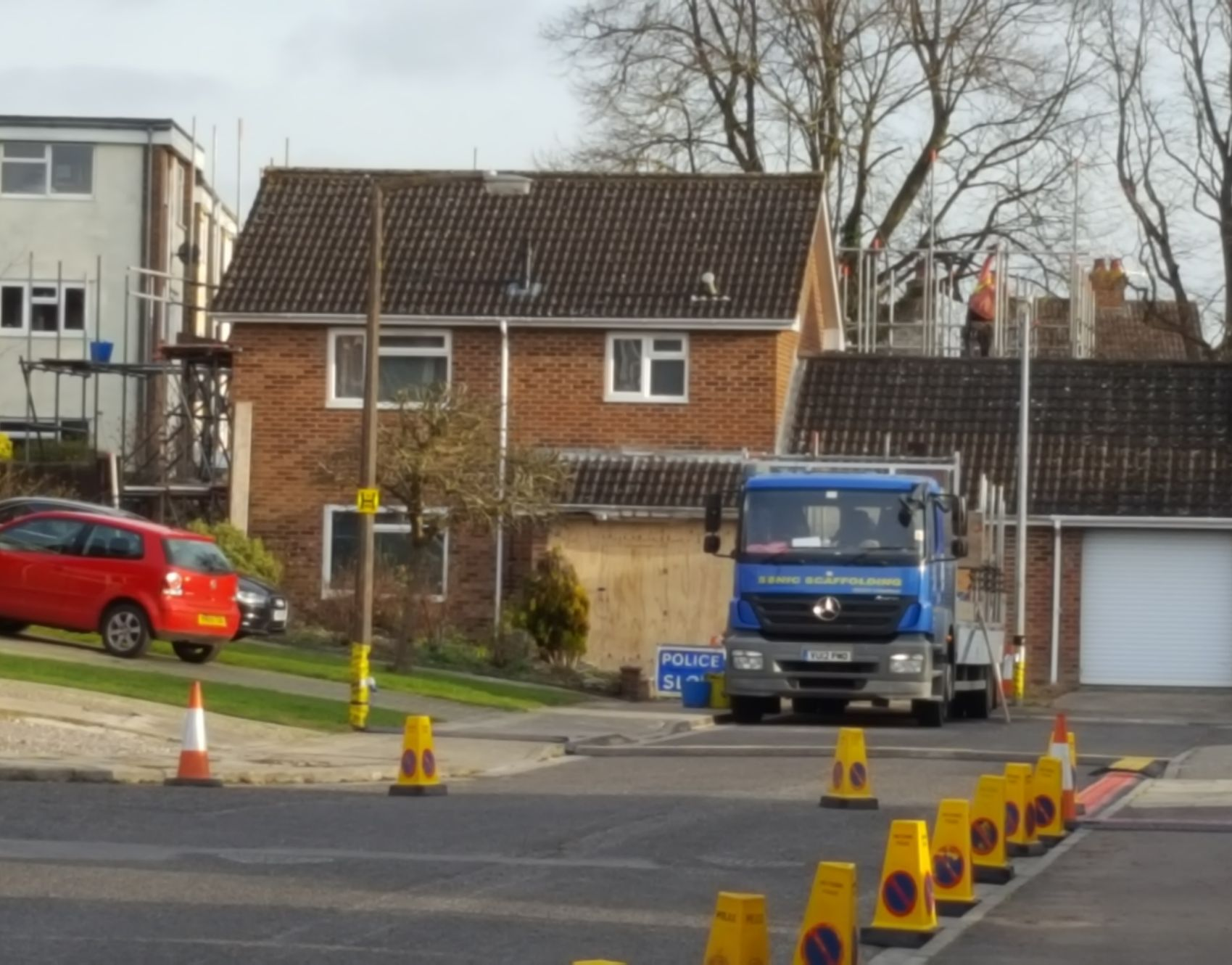 La casa en Salisbury donde vivia Sergei Skripal